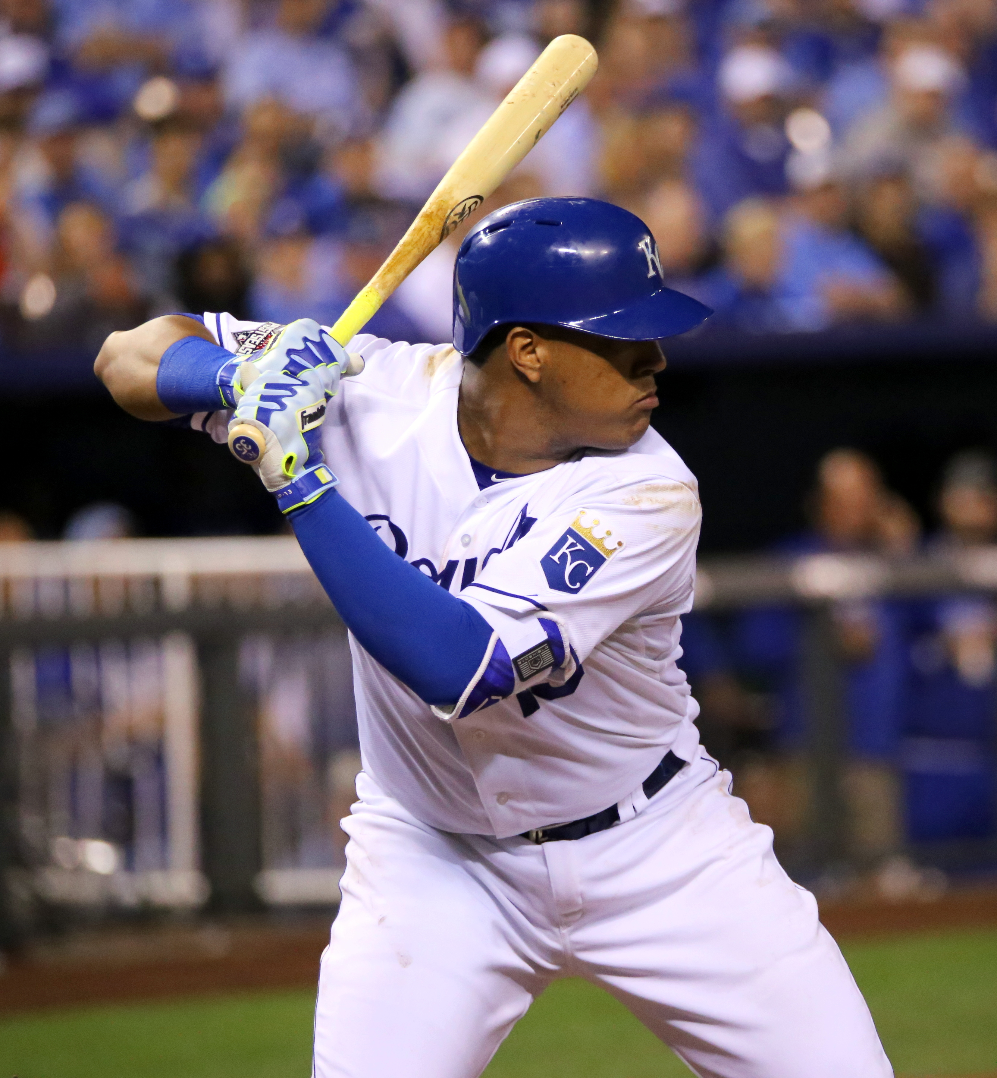 Salvador Pérez